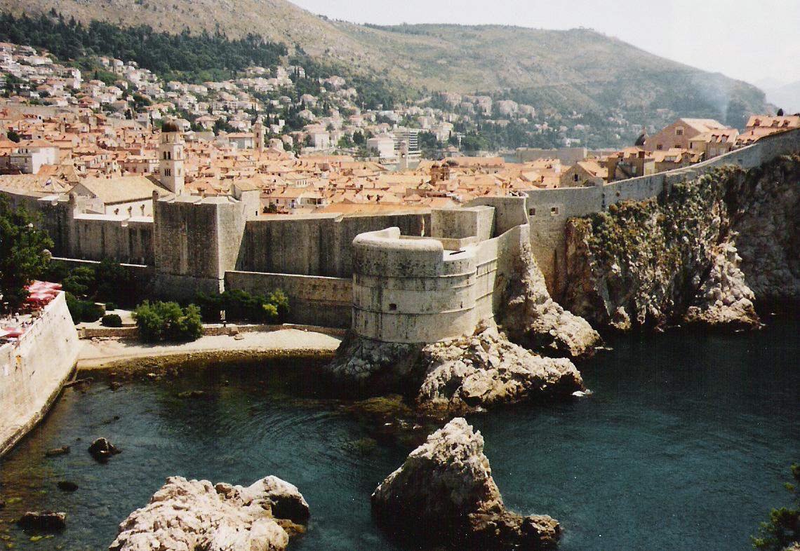 Die sechs Meter starke Stadtmauer von Dubrovnik, August 2004